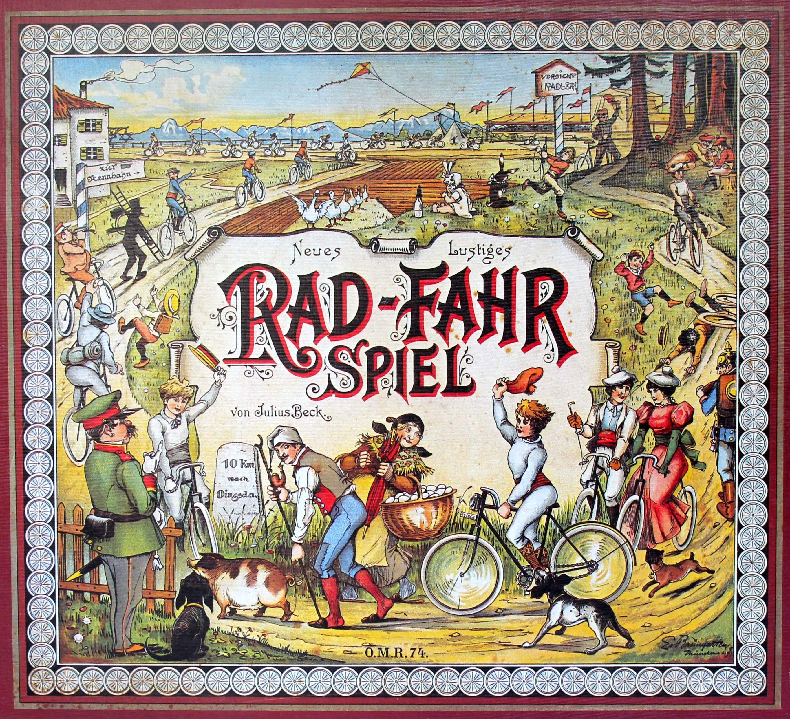 Neues Lustiges Rad-Fahr Spiel von Julius Beck (1852-1920). Illustration Eugen von Baumgarten (1865-1919)